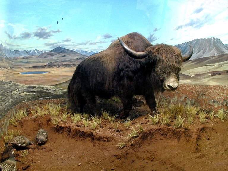 Diorama con yak nel suo habitat naturale, al Museo di storia naturale di Milano